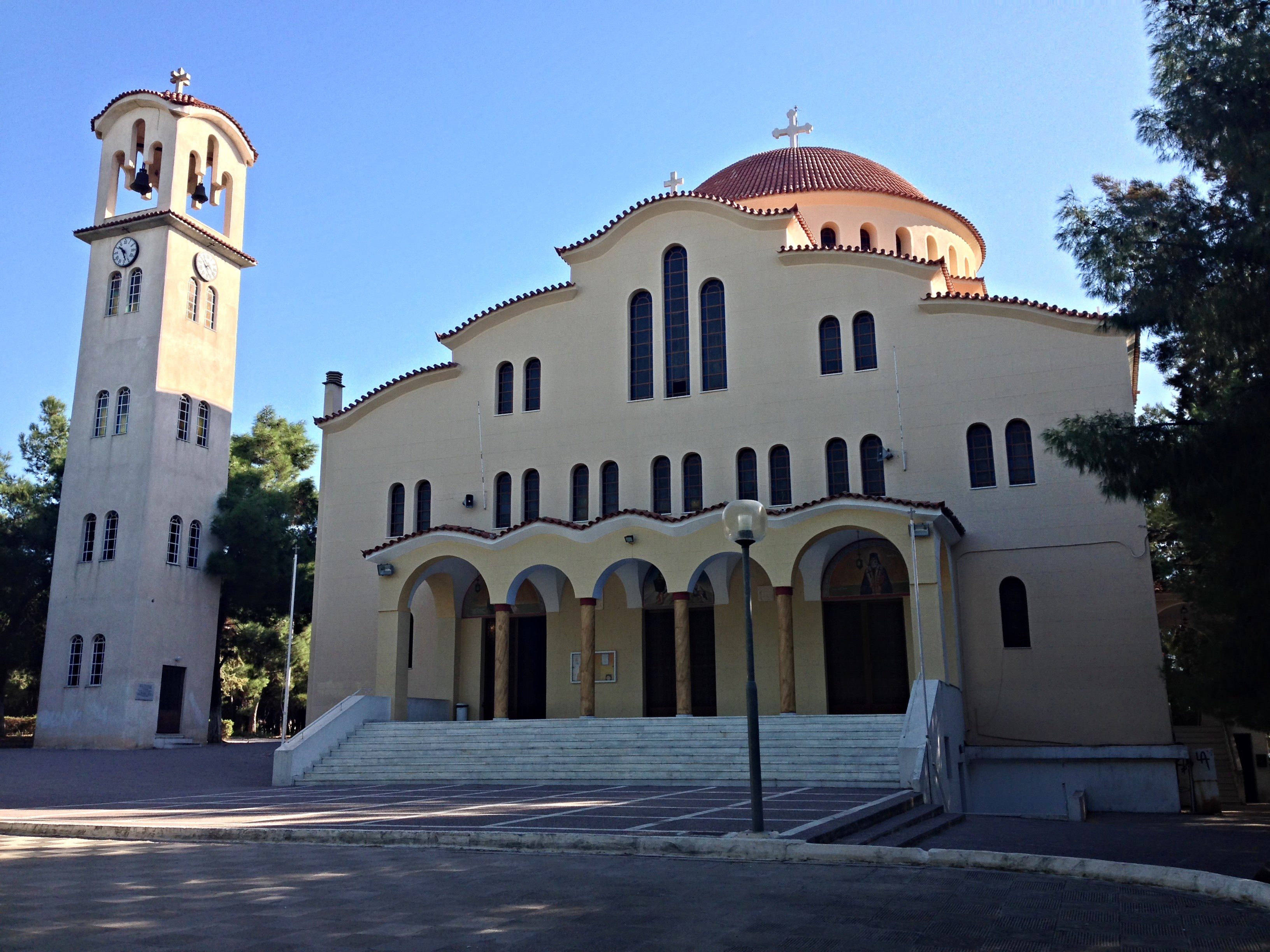 Μεταμόρφωση του Σωτήρος, Αλσούπολη Νέας Ιωνίας